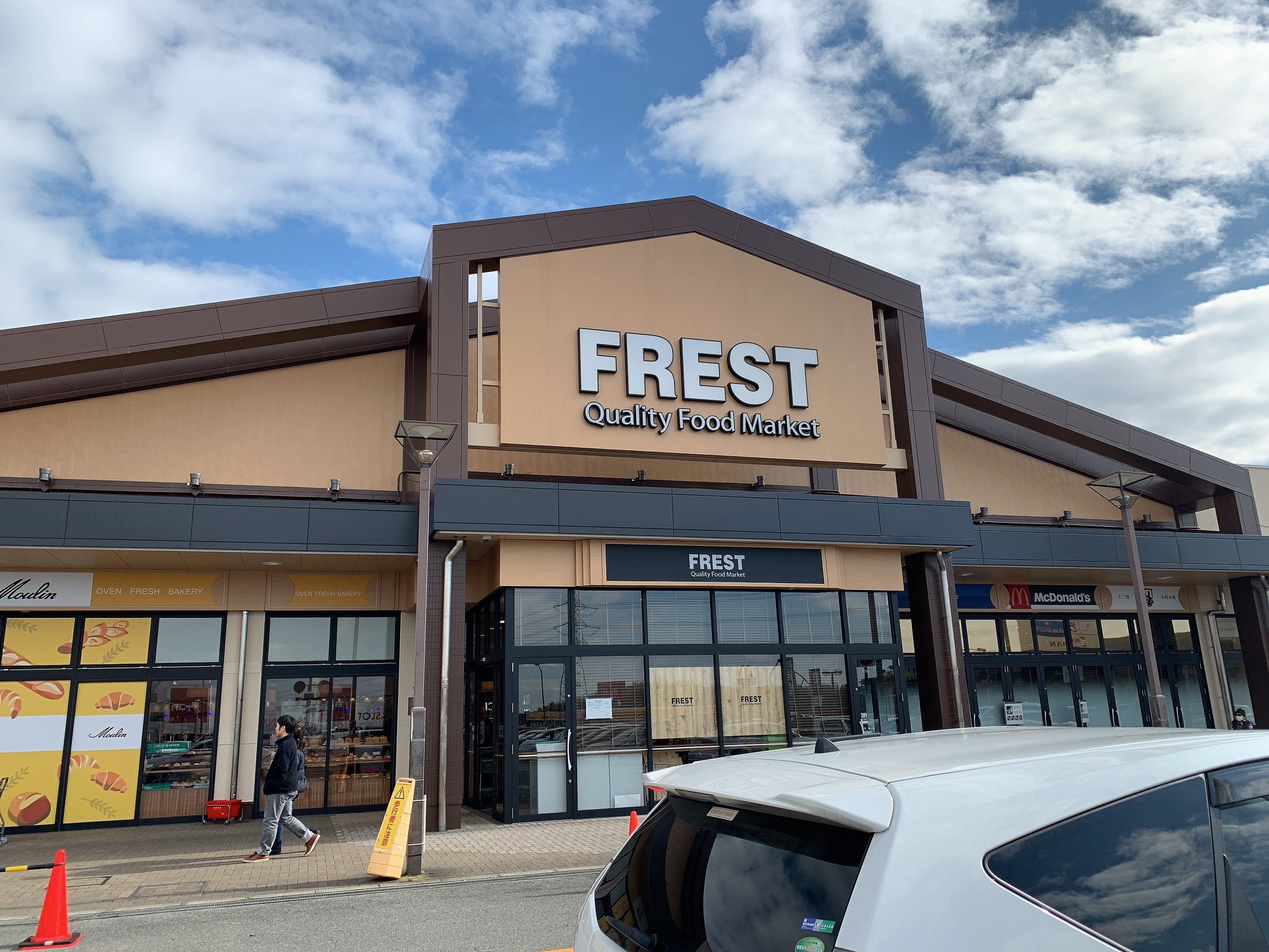 Frest Matsui Yamate store